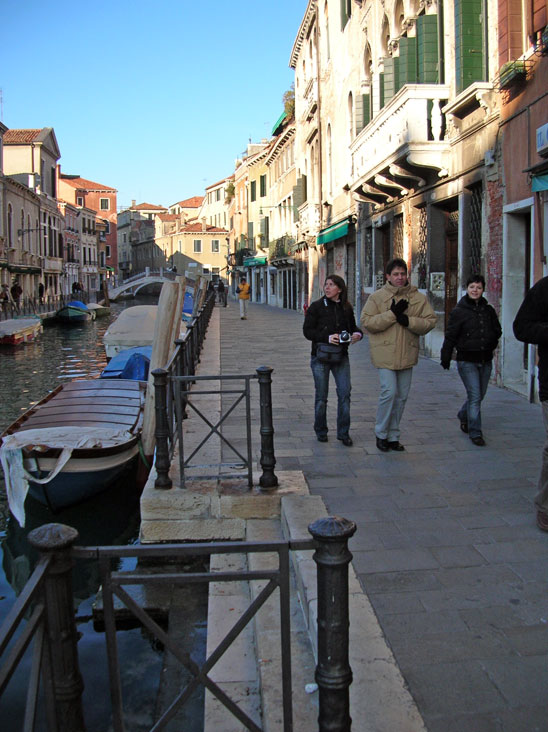 "Fondamenta" (= via che corre lungo un canale) veneziana.